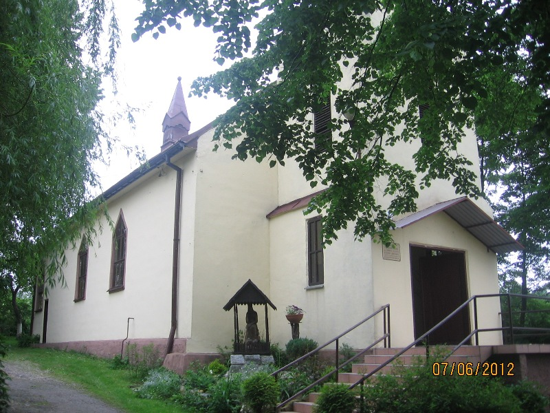 Kościół Polskokatolicki - Łęki Dukielskie